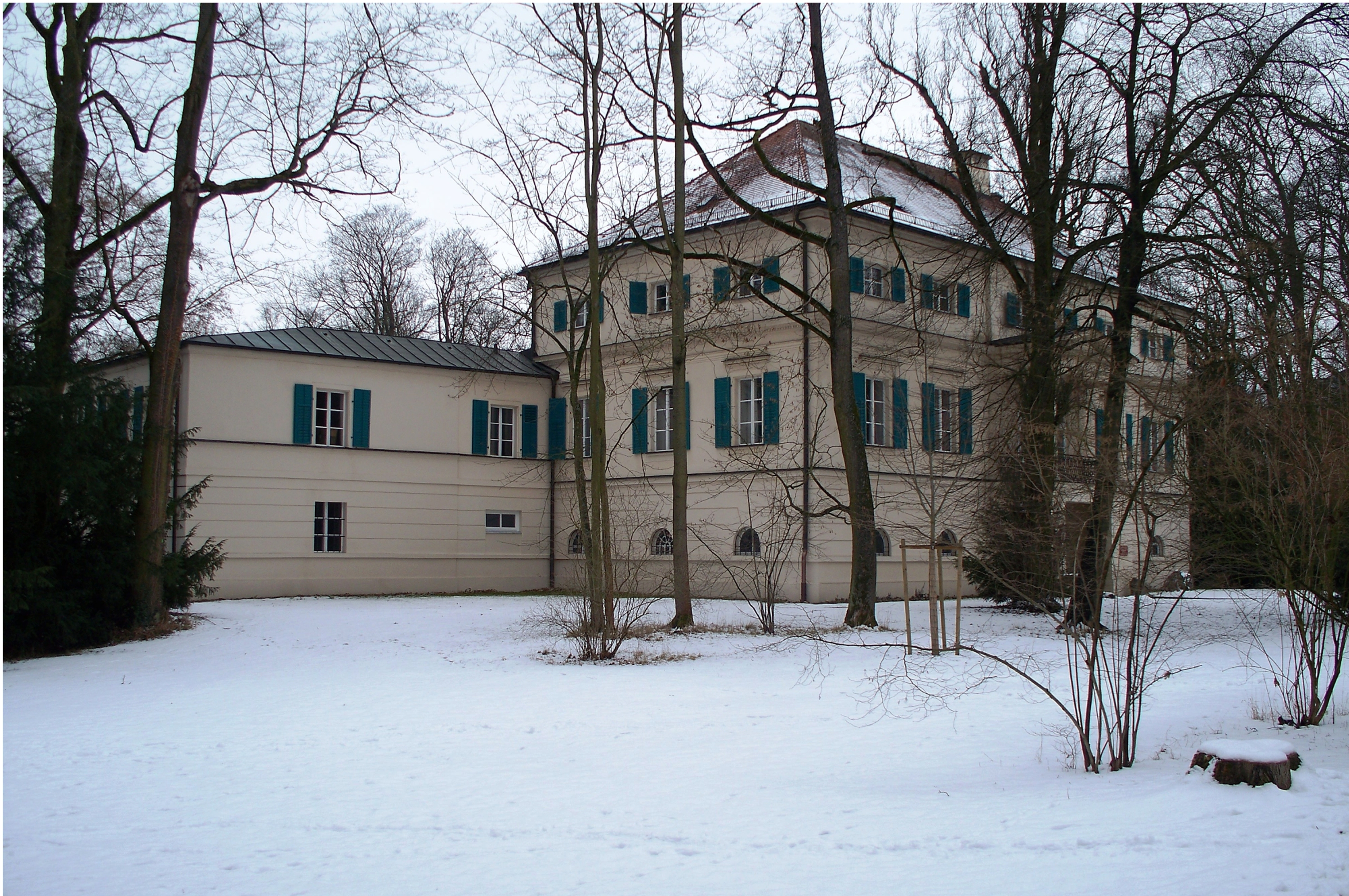 Eine Villa im 7 Hektar großen Dörnberg-Park in Regensburg. Von 1864 bis 1867 wurde der Park vom Gartenbauarchitekten von Effner als englischen Landschaftsgarten gestaltet. Bis 1897 war die Parkanlage im Besitz des Grafen von Dörnberg. Der Park steht unter Denkmalschutz. Heute ist der Park täglich für Besucher frei zugängig.